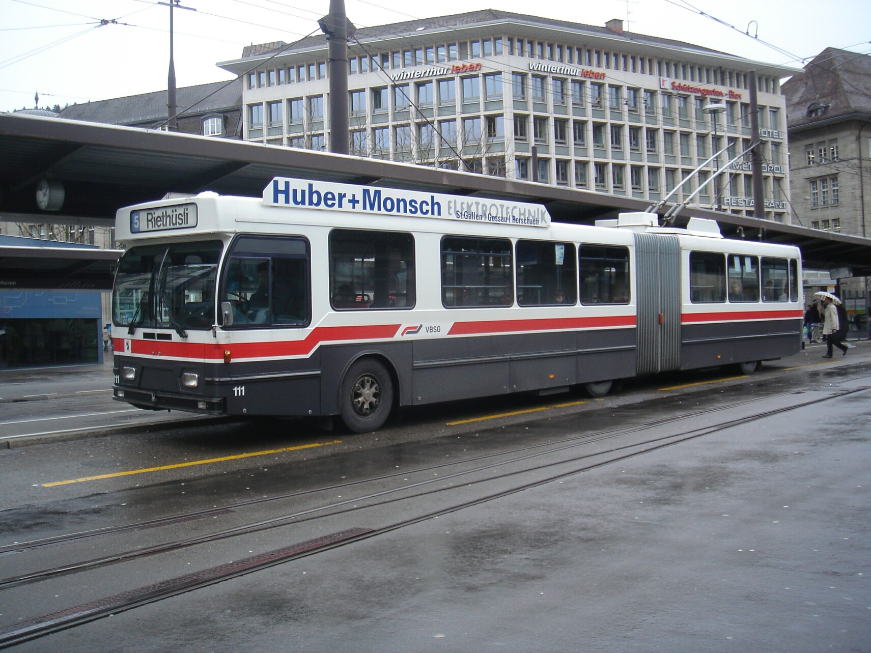 Trolleybus Nr. 111 der VBSG am Bahnhof St. Gallen (Linie 5); Typ GT 560/620-25 (1984)